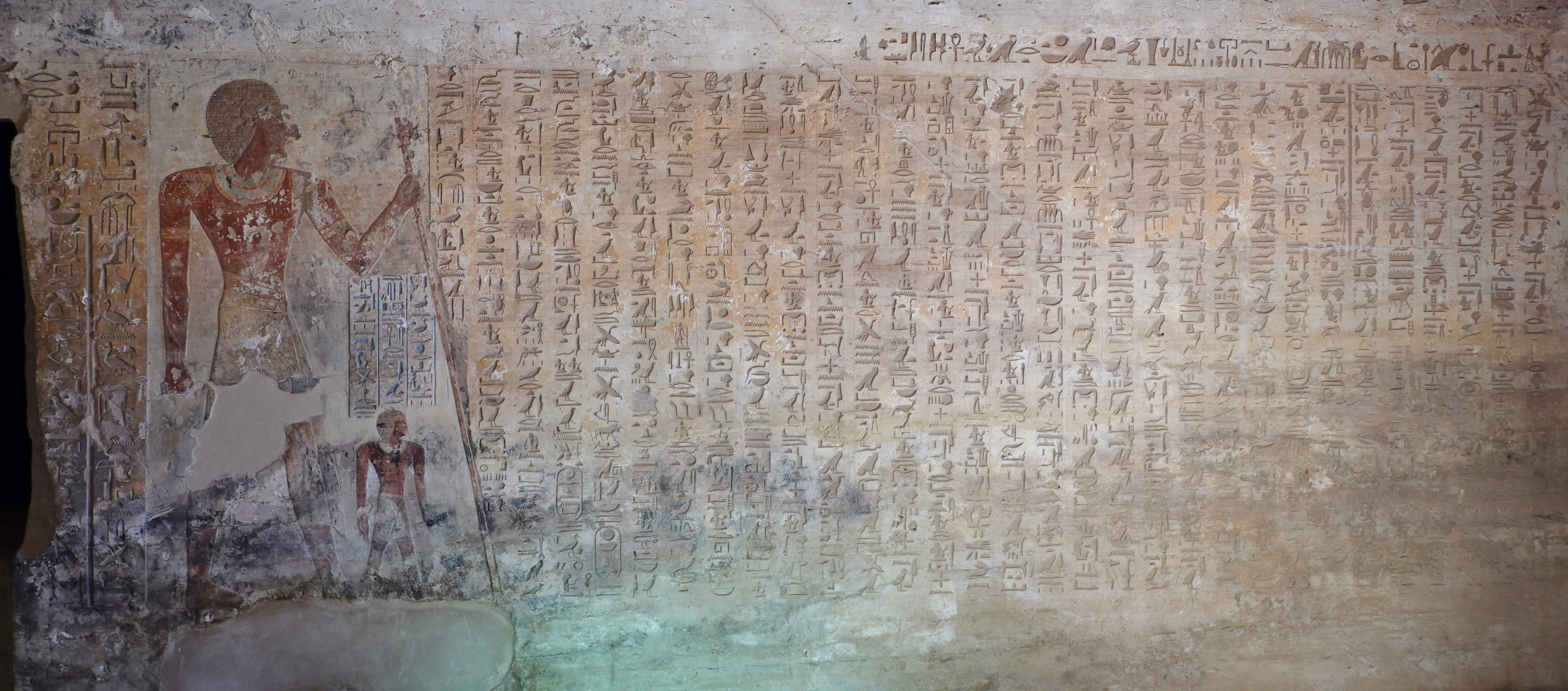 Felsengrab des Ahmose, Sohn von Ibana, unter den Felsengräbern des altägyptischen Necheb bei el-Kab, Ägypten